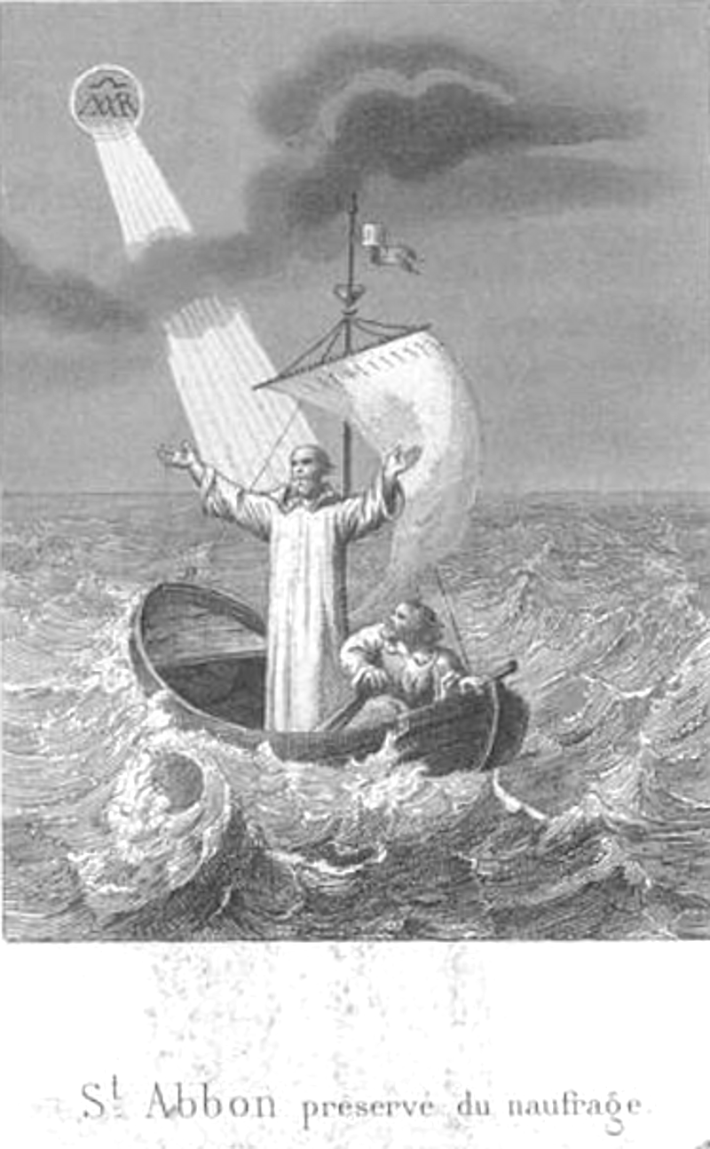 Pardiac, J.-B., abbé, Histoire de Saint Abbon, abbé de Fleury-sur-Loire et martyr à La Réole en 1004 : avec une introduction sur le Xe siècle, Paris, Librairie Jacques Lecoffre ː le naufrage.